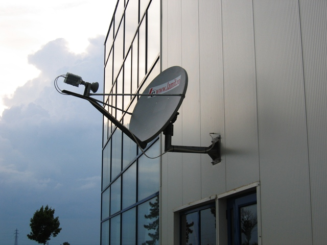 Sistem VSAT Fix Template:Wall mounted VSAT antenna system.